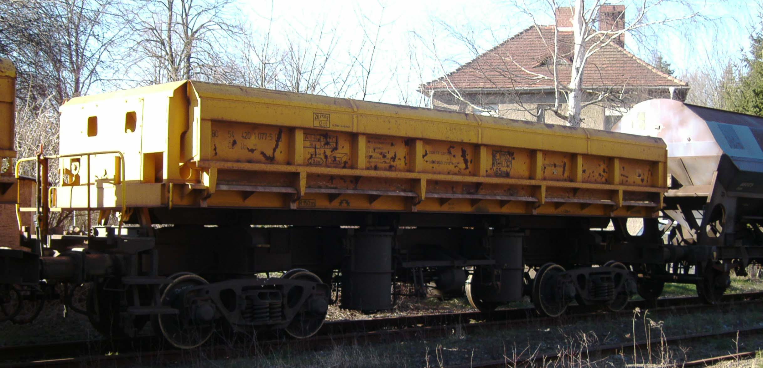 Seitenkippwagen Gattung Ua der Tschechischen Bahn - Gesamtansicht Czech Railways Class Ua side-tipper